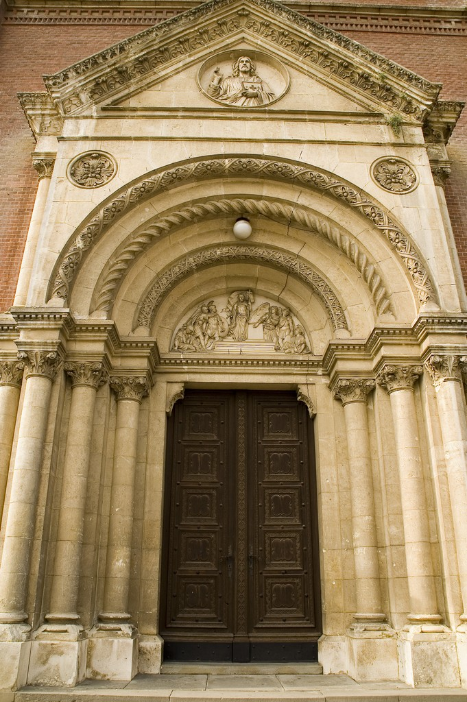 Đakovačka katedrala